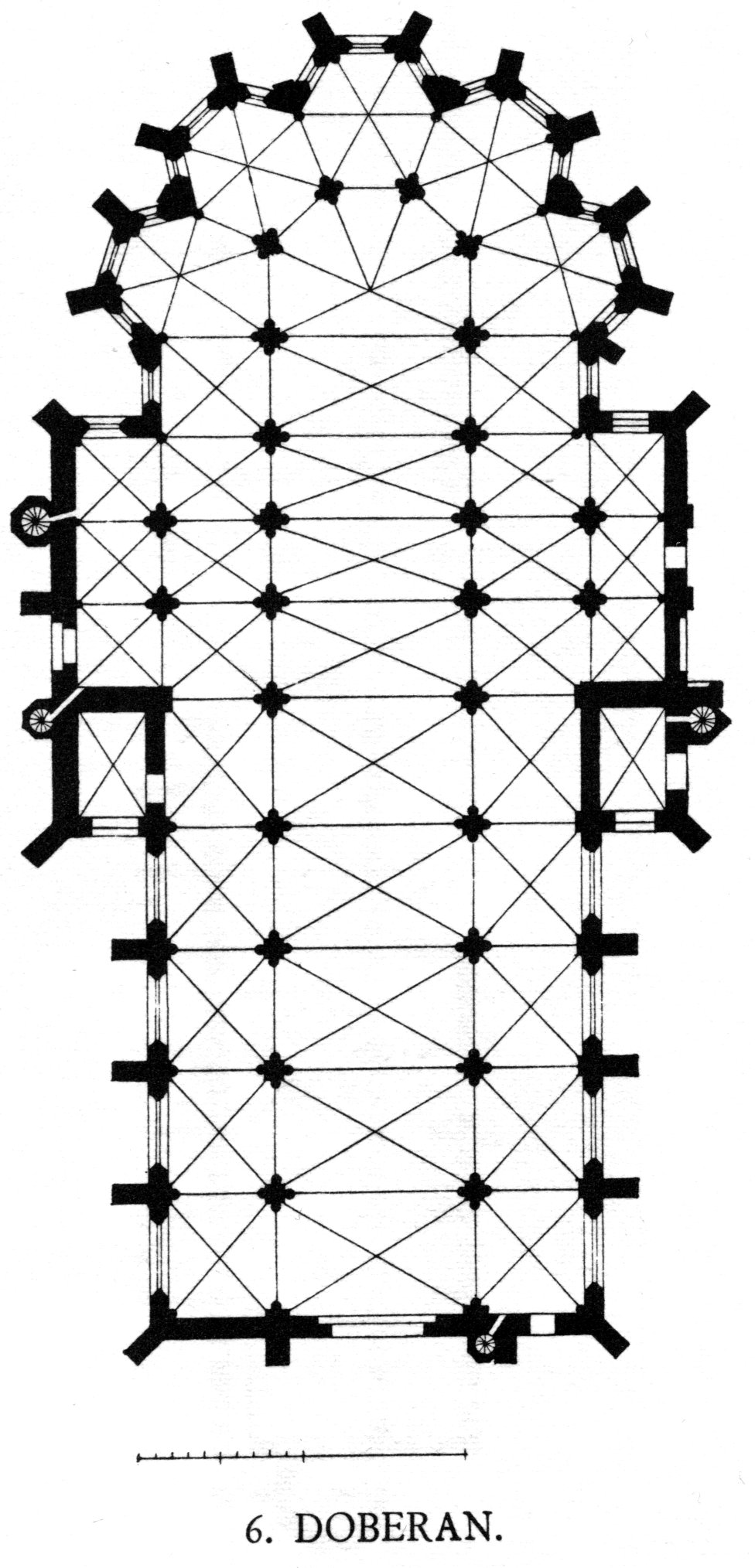 Bad Doberan, Zisterzienserkirche